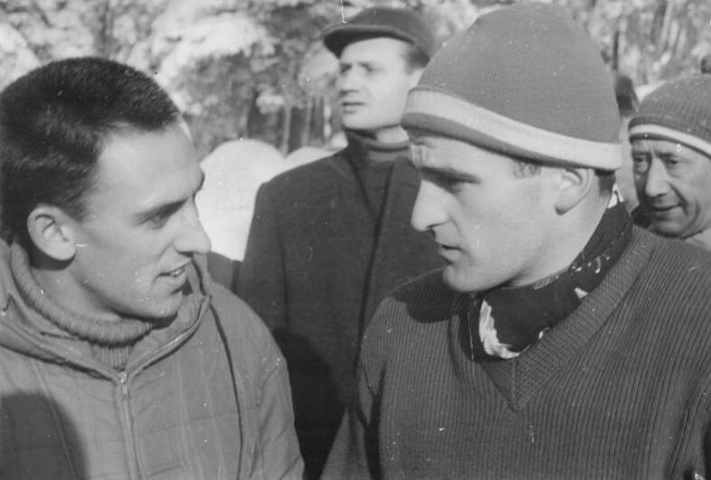 Zentralbild Schaar-Telefoto 26.12.1962 Recknagel gewann Weihnachts-Sprunglauf in Oberhof Am 26.12.1962 begann auf der Thüringenschanze in Oberhof die Springer-Saison unserer DDR-Sprunglaufelite. Weltmeister Helmut Recknagel siegte vor seinem Klubkameraden v. Kührt. UBz: Europameister über 800-Meter Manfred Matuschewski im Gespräch mit unserem Weltmeister im Spezialsprunglauf Helmut Recknagel.